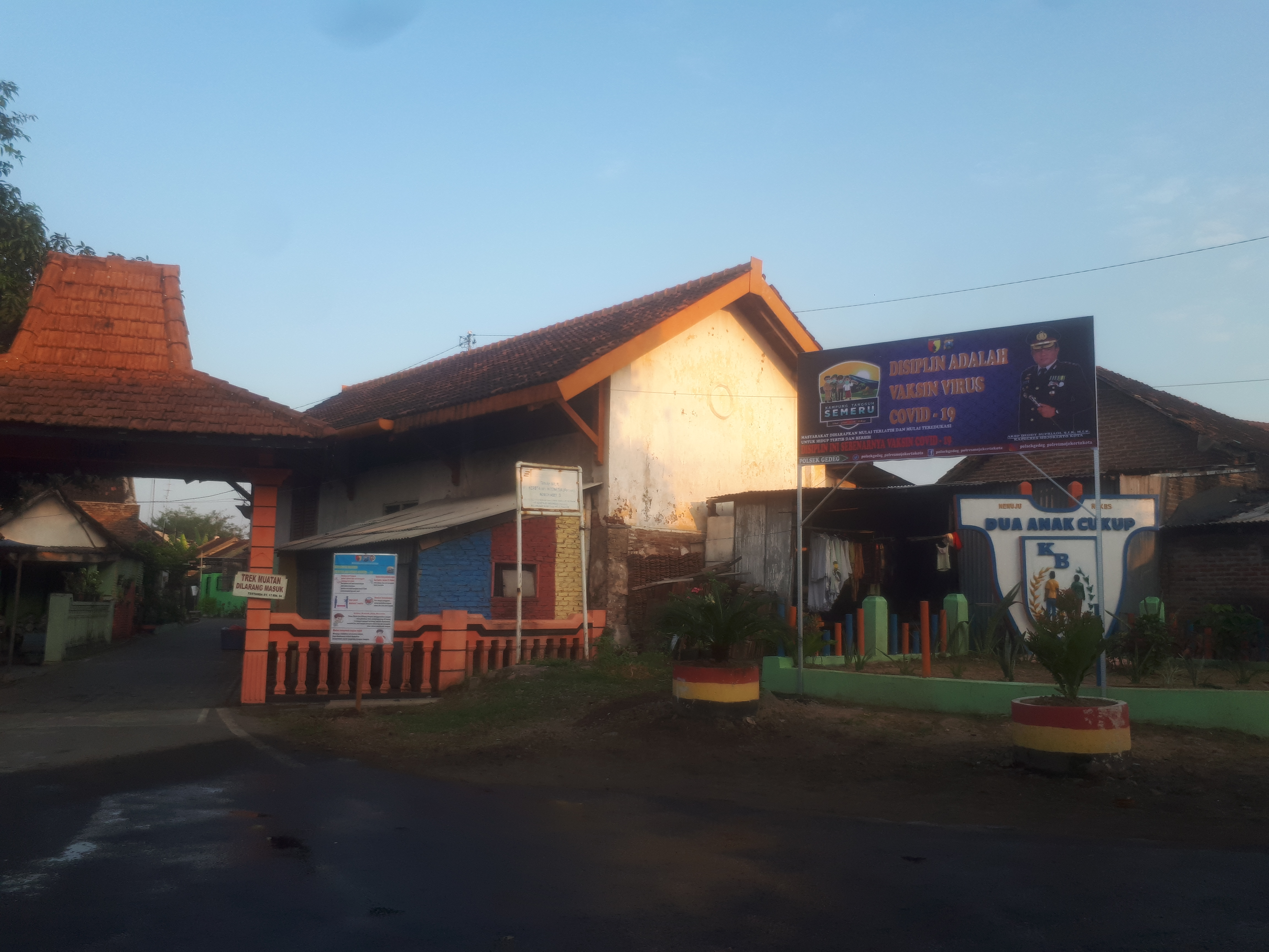 Tampak luar bangunan Stasiun Gempolkerep dari sisi selatan, 2020